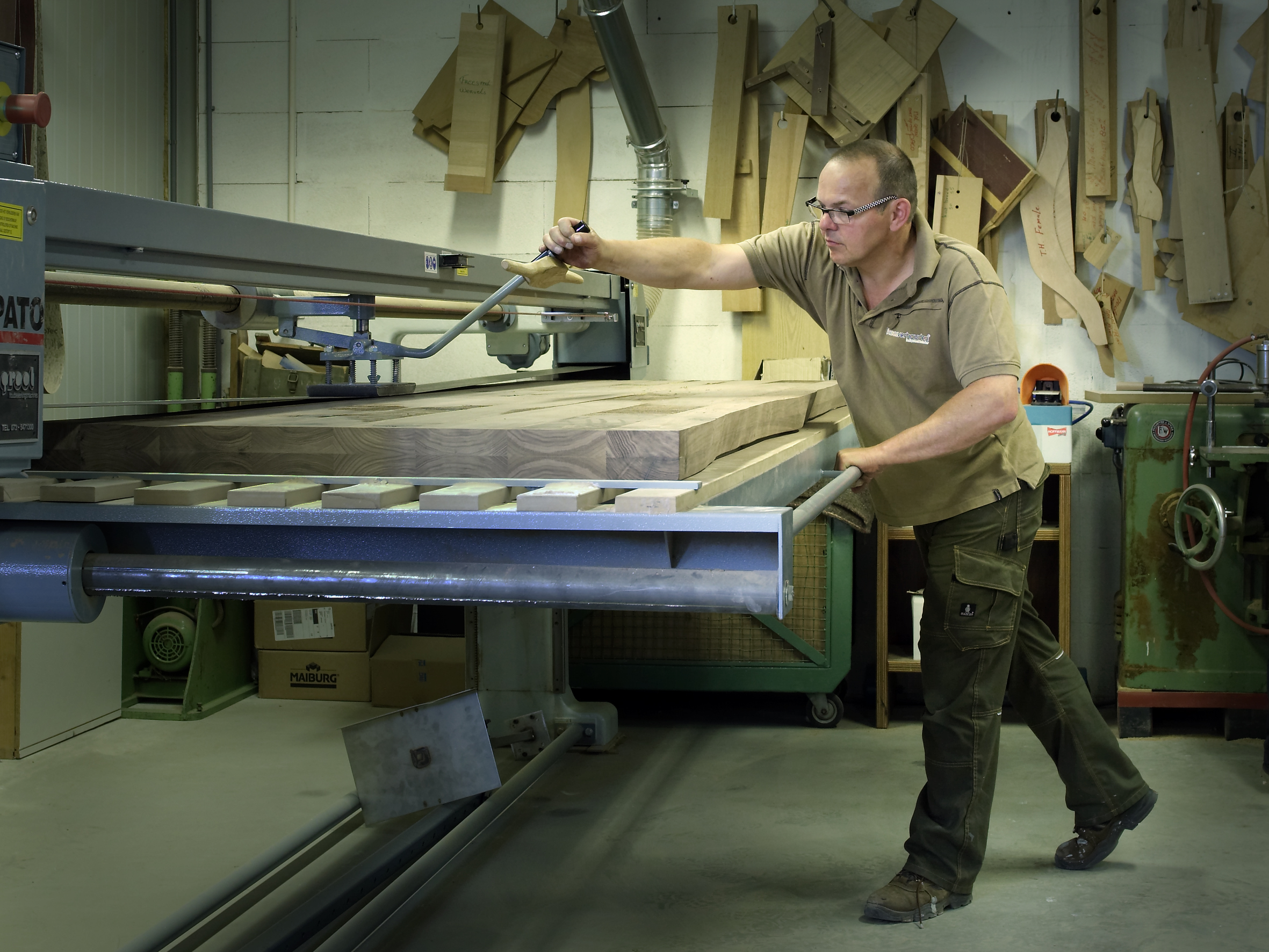 Schuurmachine meubelmakerij Kees Verhouden